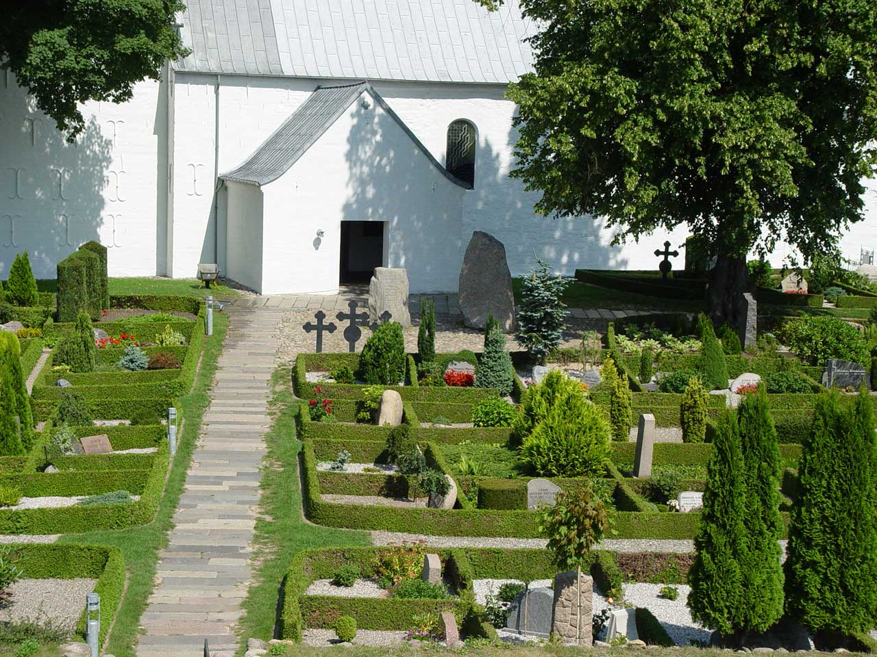 Runensteine von Gorm und Harald an der Kirche in Jelling (Blick vom suedlichen Huegel)